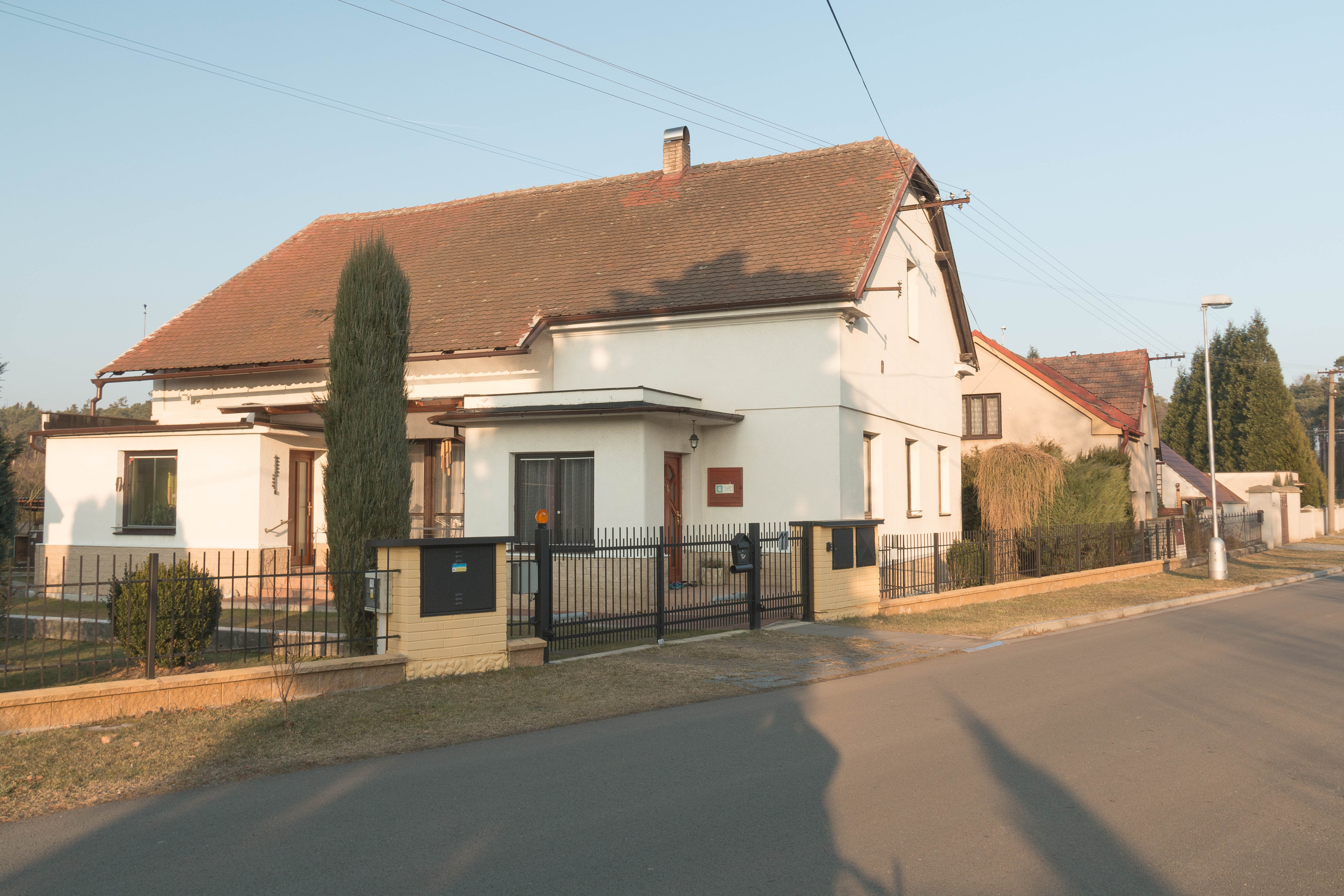 Dědek čp. 11